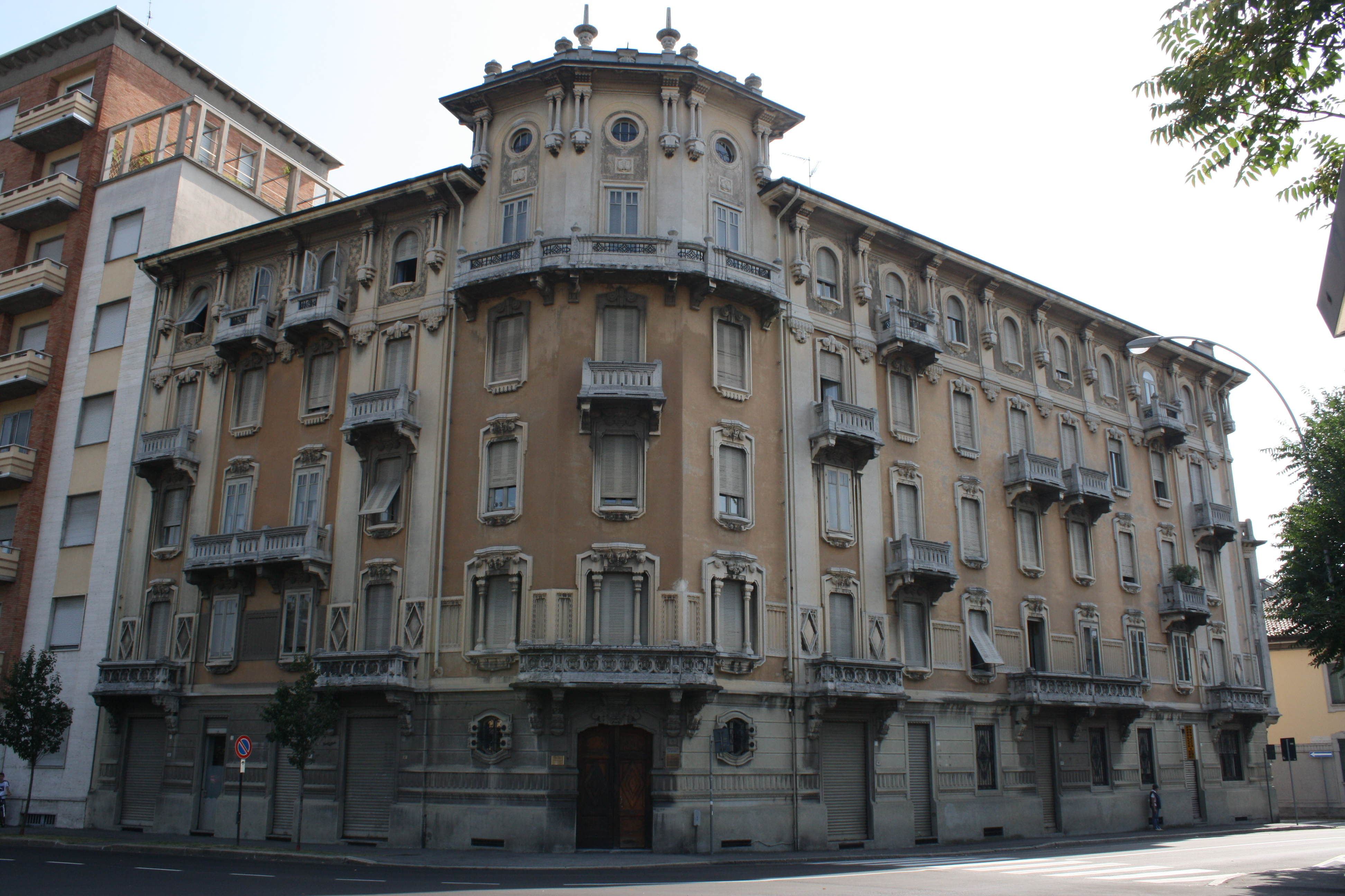 Casa Frangi, opera di Silvio Gambini del 1926 all'angolo tra Piazza Volontari della Libertà e via Mameli a Busto Arsizio (VA).